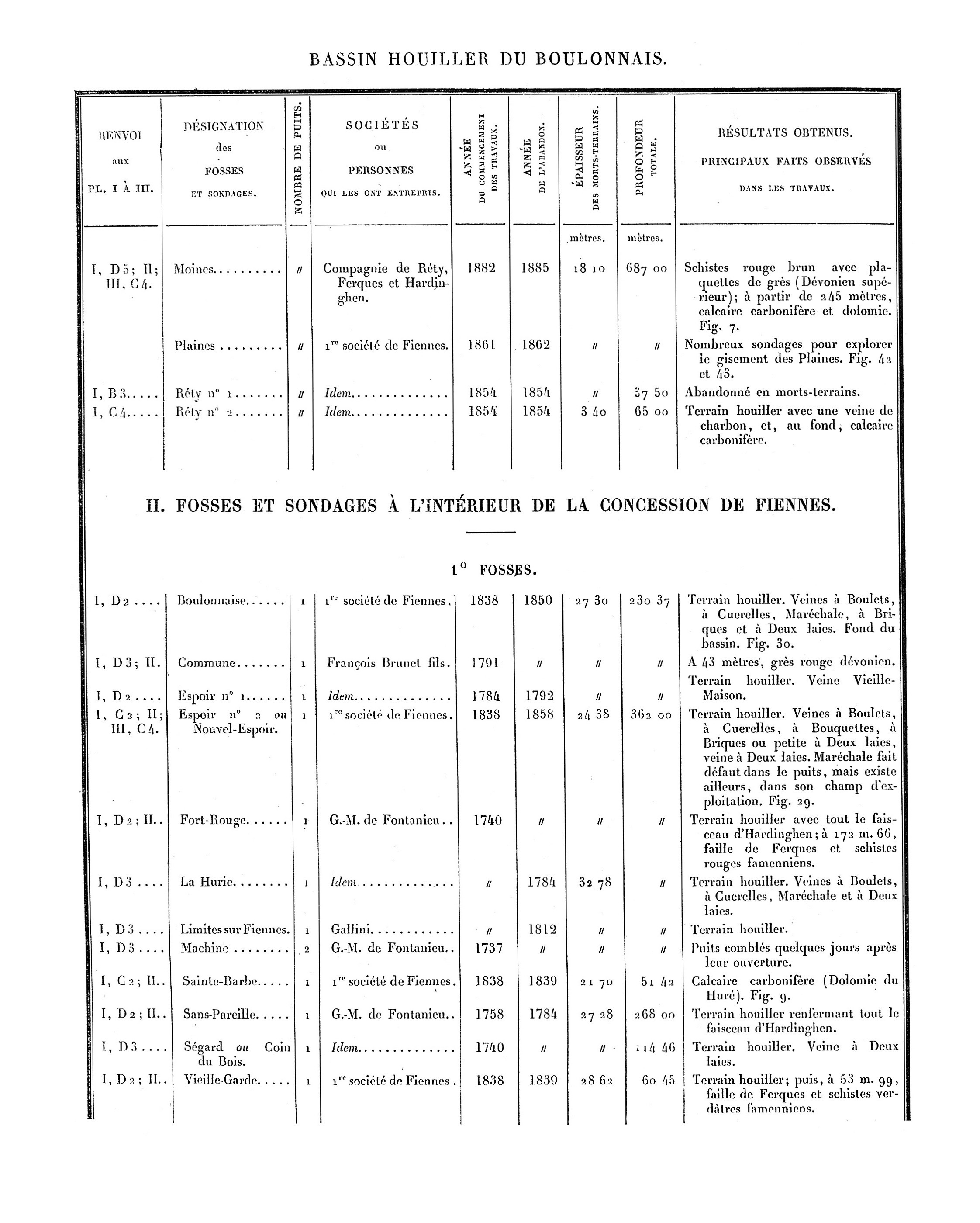 Liste des puits de mine et des sondages. Mines du Boulonnais. Document extrait de Étude des Gîtes Minéraux de la France. Topographie Souterraine du Bassin Houiller du Boulonnais ou Bassin d'Hardinghen, par A. Olry, ingénieur en chef des Mines. Chapitre IX, pages 172 à 189.